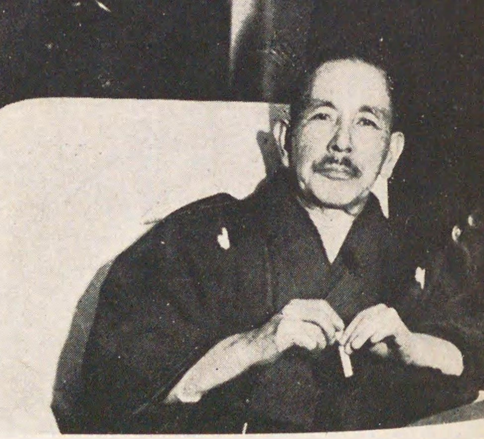 立憲政友会総務・望月圭介